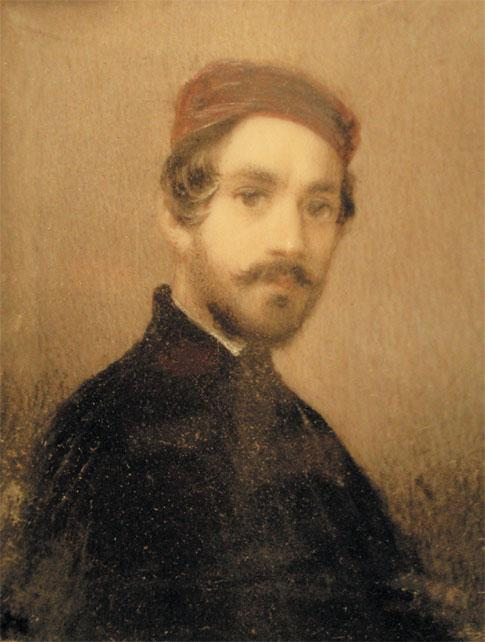 Козрое Дузи (автопортрет) 1830